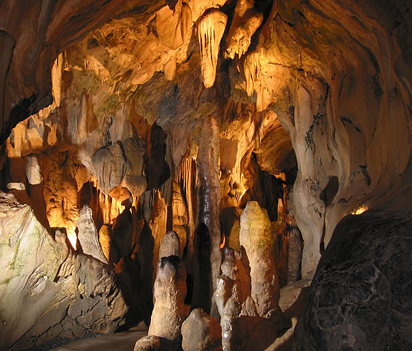 Bilsteinhöhle, Warstein: Halle der 60 Riesen